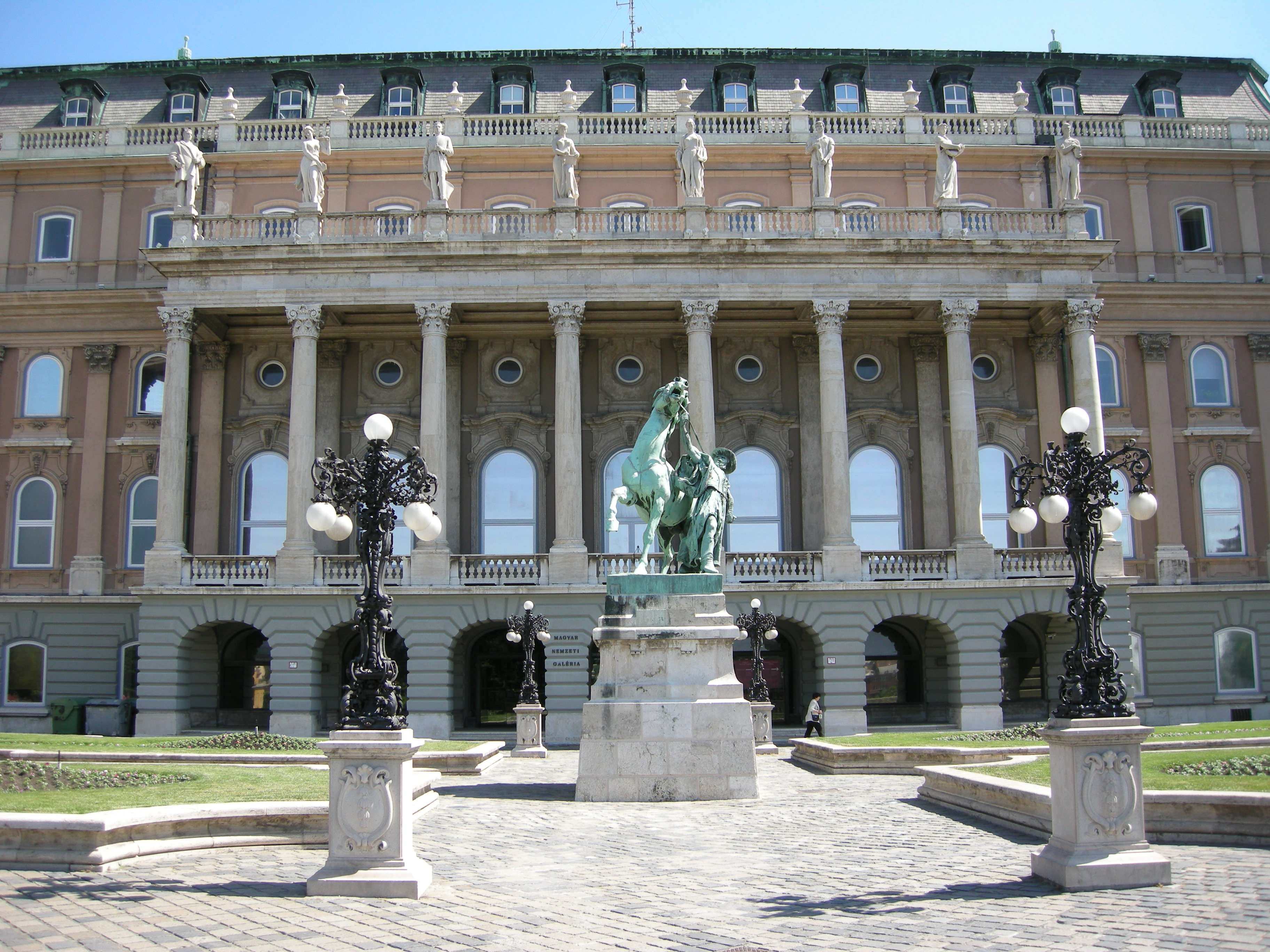 Budapest